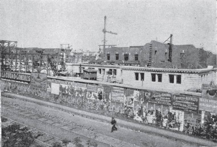 Vista de la construcción del Palacio del Congreso Nacional de la Argentina, a mediados de 1900.